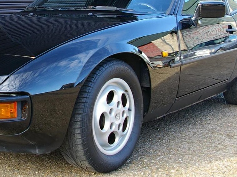 Detalle de la aleta delantera